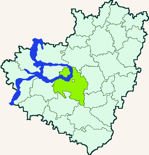 Samara Oblast map by Al Silonov Карта районов Самарской области